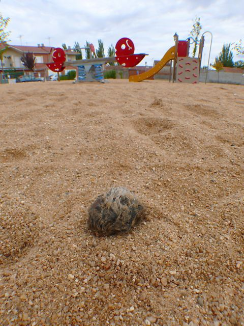 Cadáver de topillo (Microtus arvalis asturianus) muerto en el arenero de un parque infantil